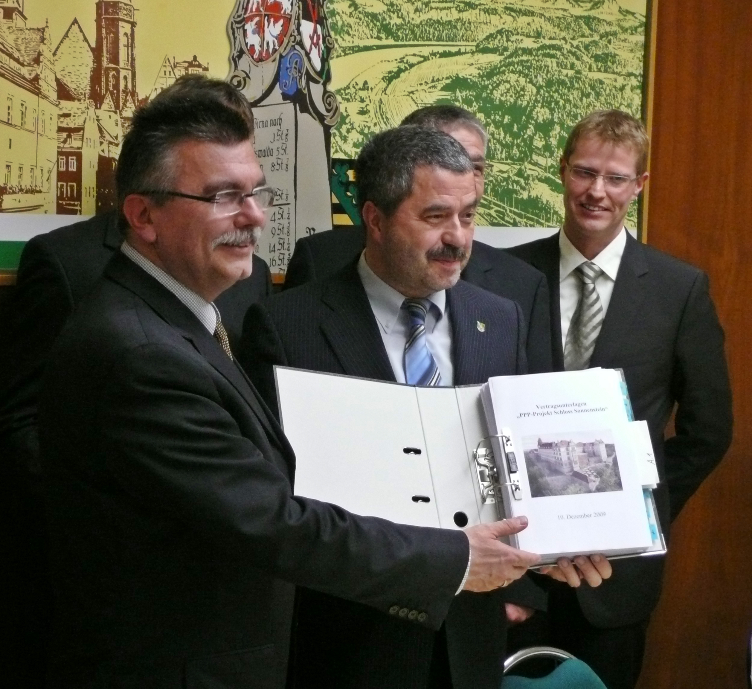 Das Bild zeigt die Unterzeichnung des PPP-Vertrages zwischen dem Landkreis Sächsische Schweiz-Osterzgebirge und dem Bau- und Dienstleistungskonzern Bilfinger Berger zu Sanierung und Betrieb von Schloss Sonnenstein in Pirna als Sitz der Kreisverwaltung des Landkreises Sächsische Schweiz-Osterzgebirge. Bildmitte: Landrat Michael Geisler (CDU).